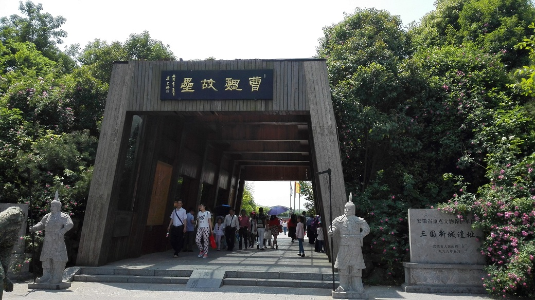 中文（中国大陆）: 合肥三国新城遗址公园